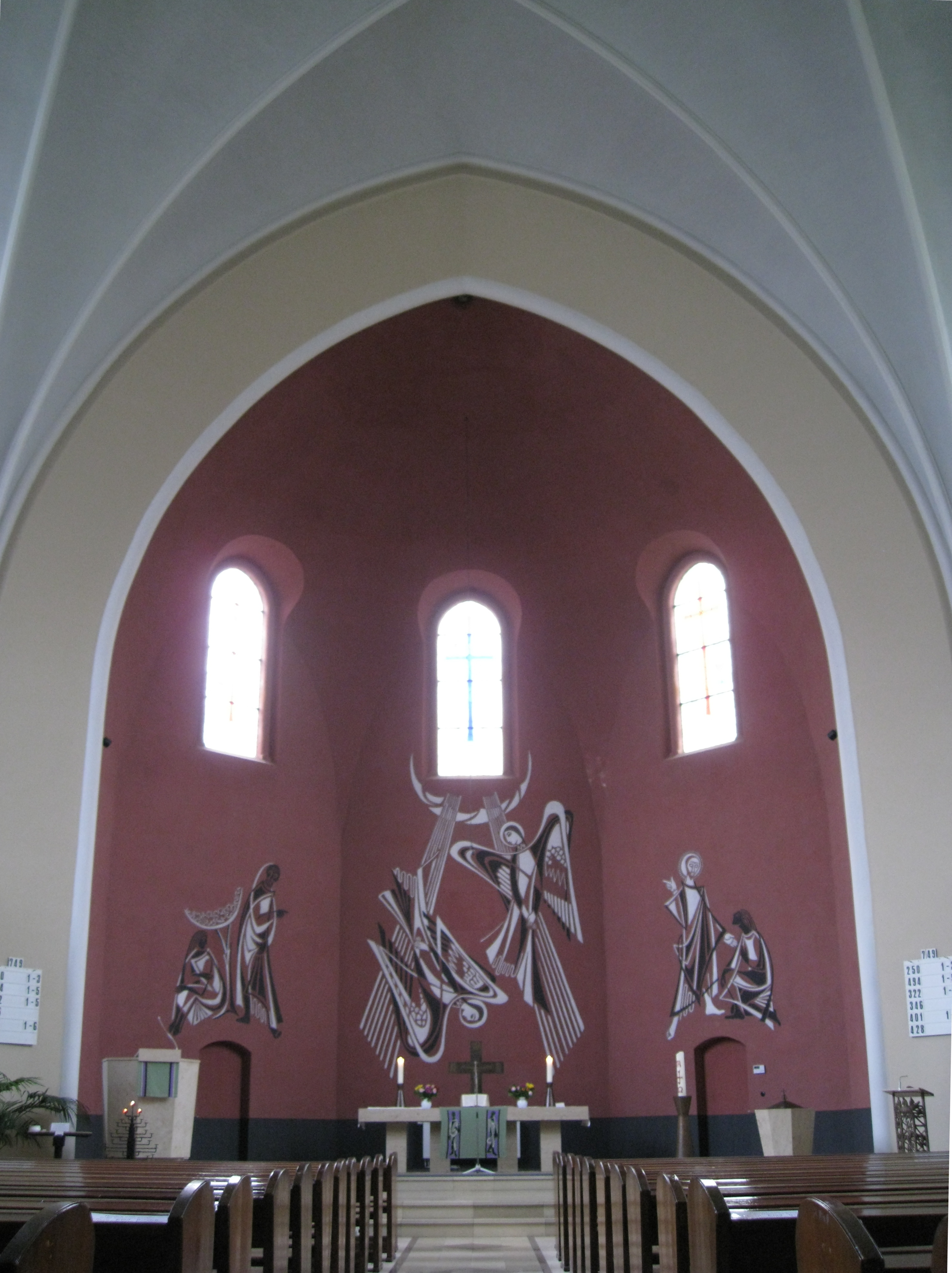 Blick auf den Altar